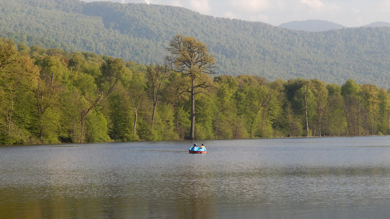 دریاچه الندان در بخش چهاردانگه ساری